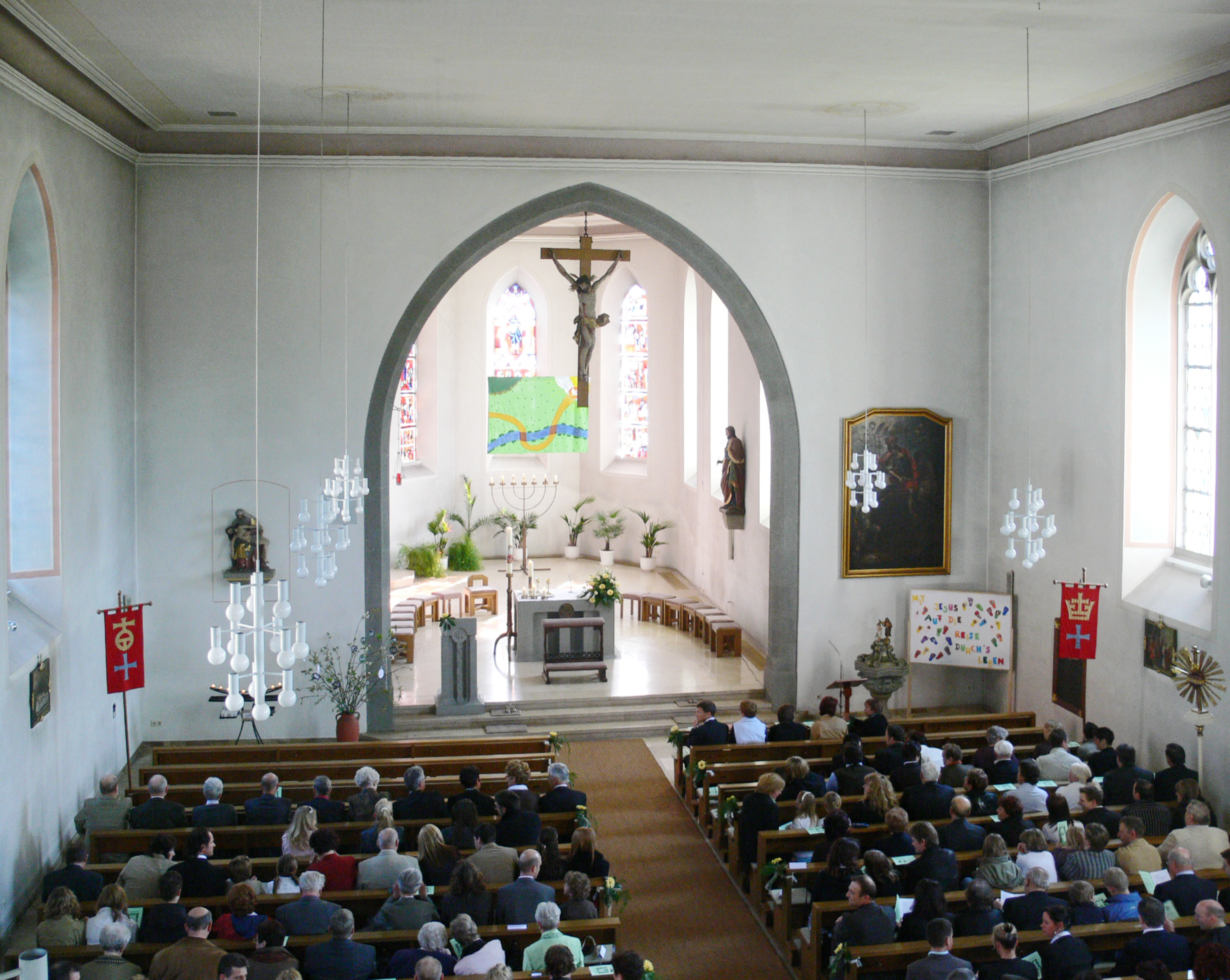 Pfarrkirche St. Martinus, Oberteuringen, Bodenseekreis